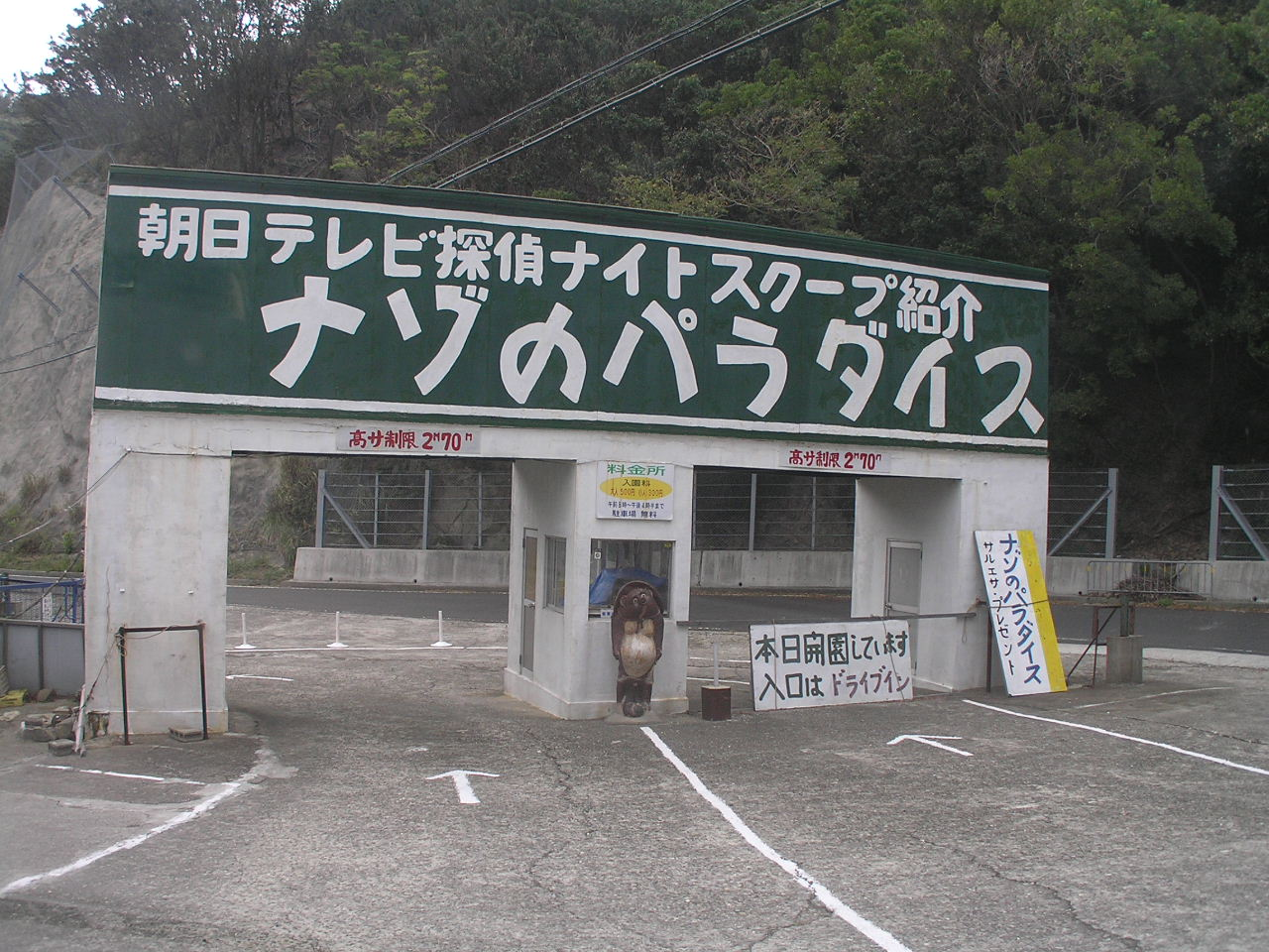 立川水仙郷ゲート